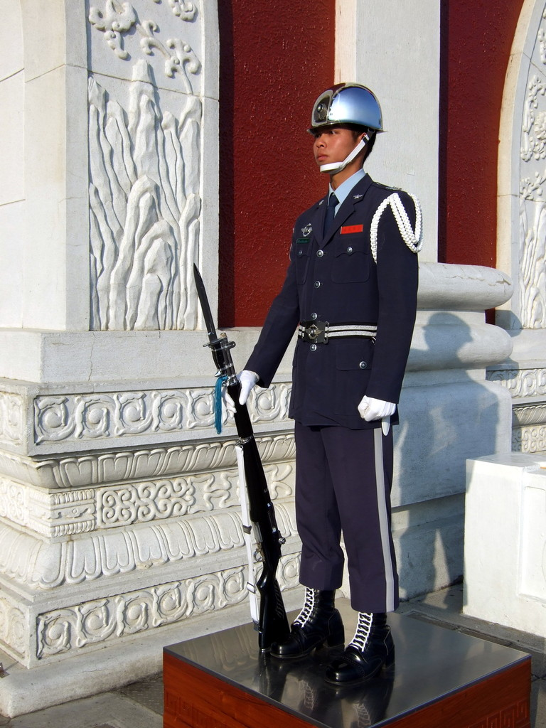 República Popular de China de la Fuerza Aérea de la Guardia de Honor (Mártires).